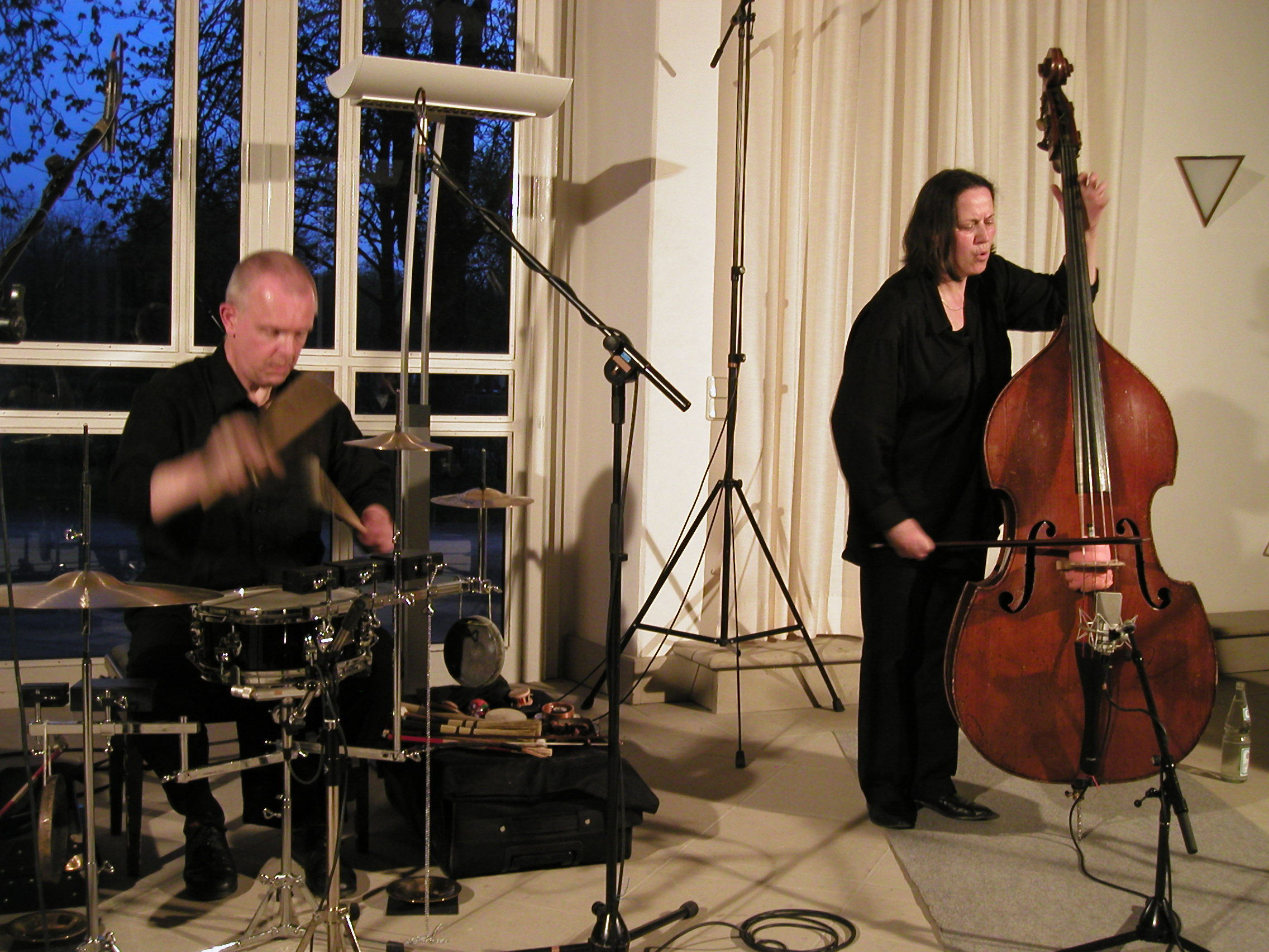 Joëlle Léandre (standing) und Fritz Hauser mit Quartet Noir im Schloß Weikersheim